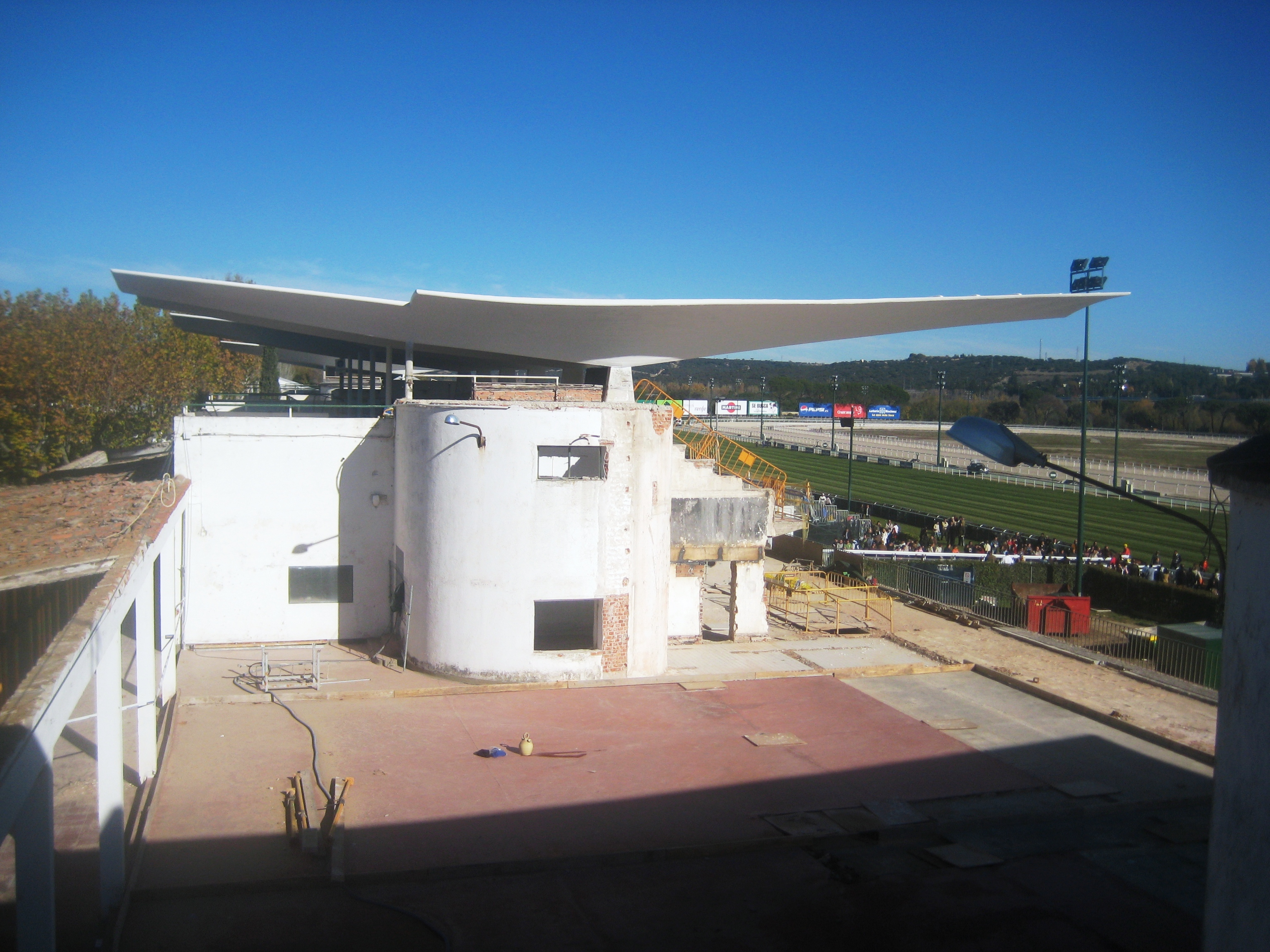 Cubierta del Hipódromo de la Zarzuela